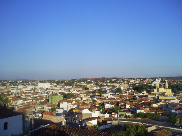 Crato de tarde